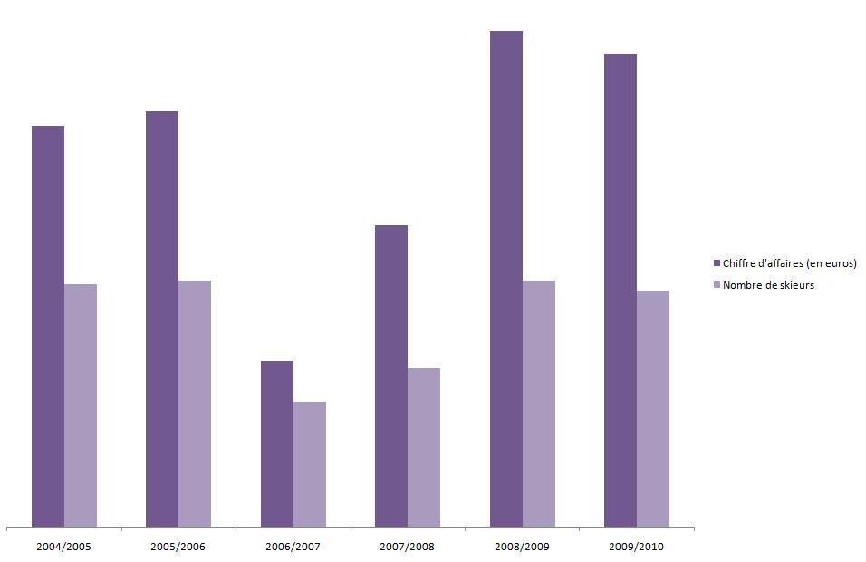 L'évolution du chiffre d'affaires de la station de sports d'hiver d'Ax 3 Domaines.